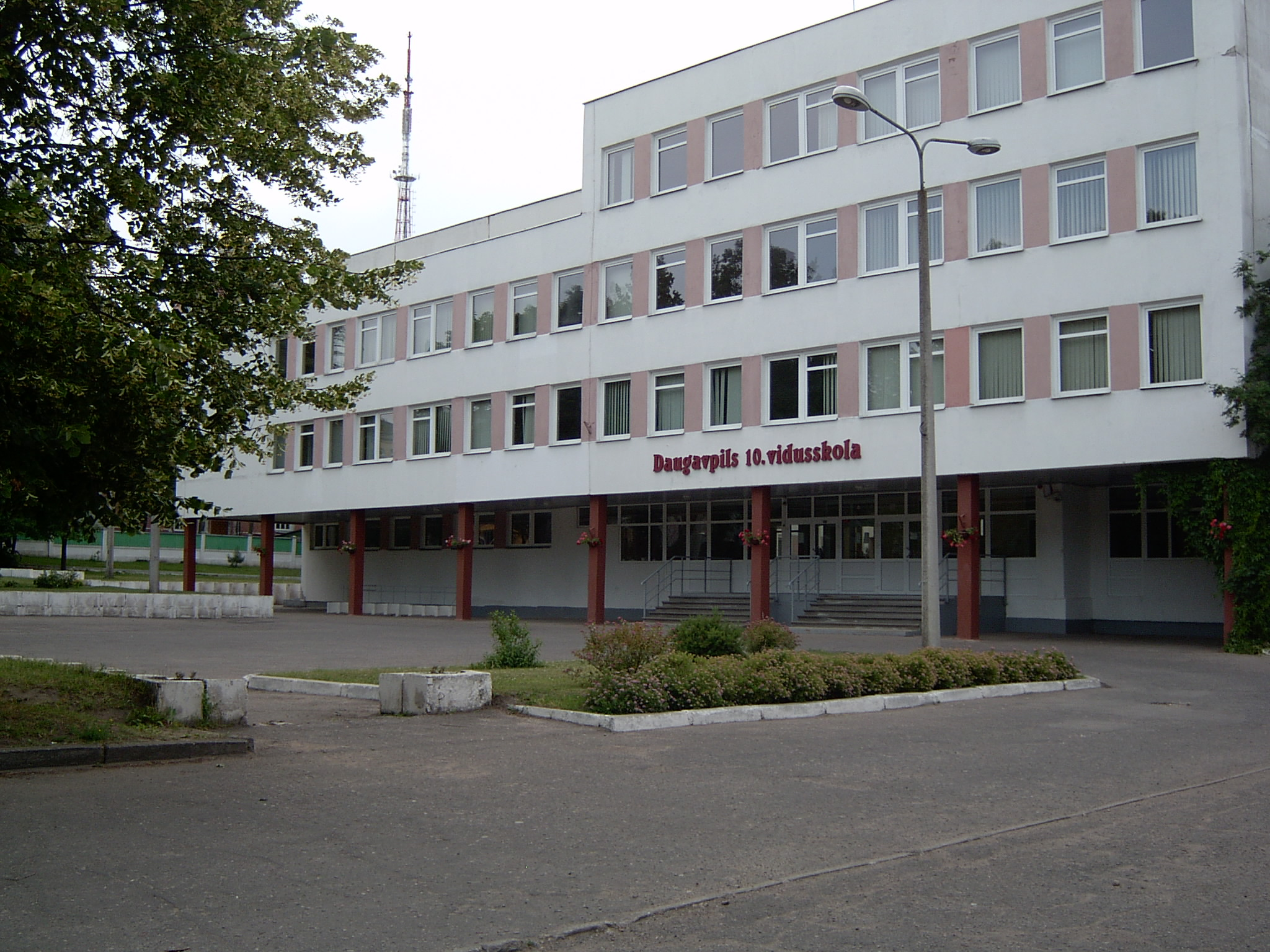 Daugavpils 10. vidusskola